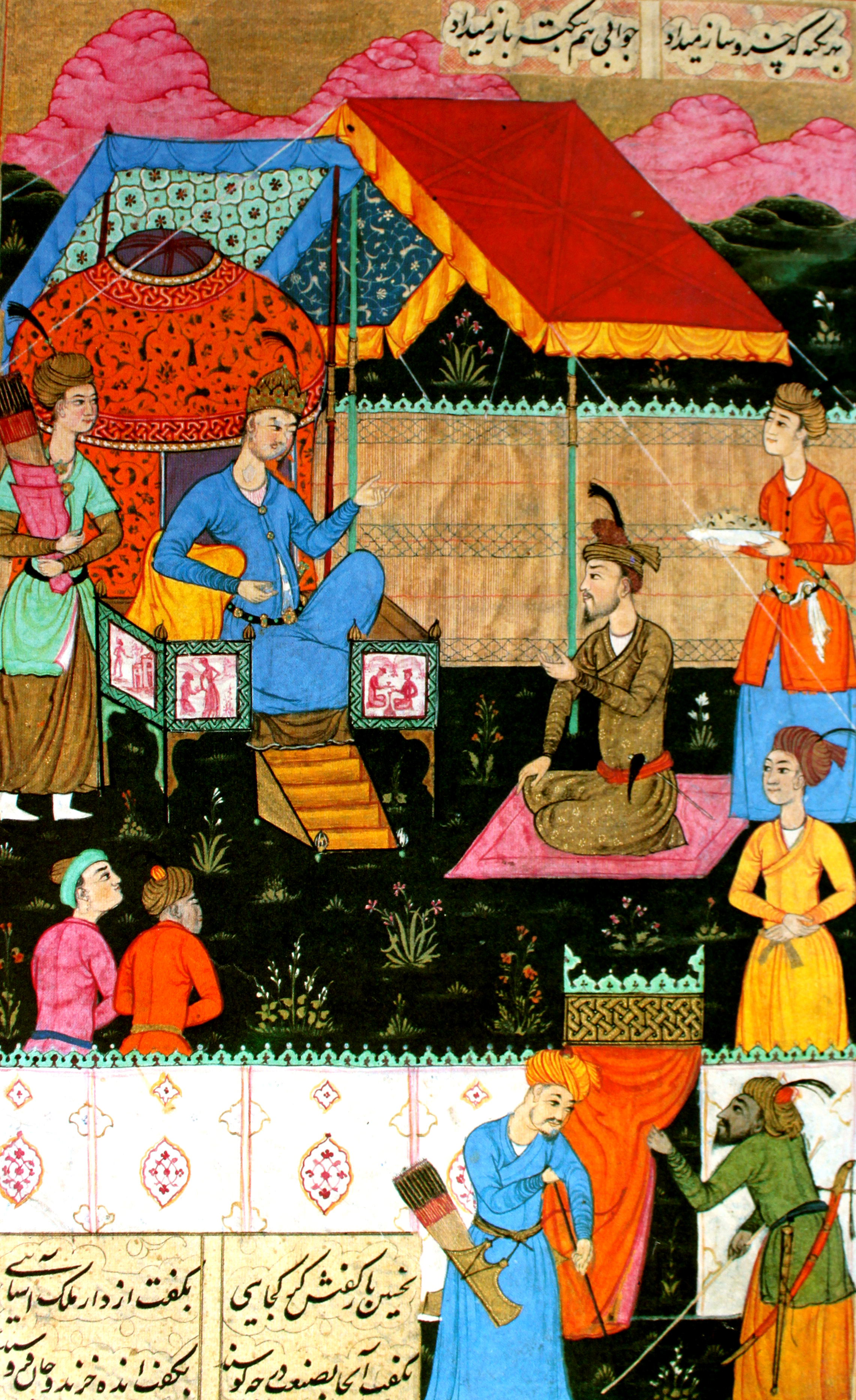 Xosrov və Fərhadın söhbəti, 1648, Buxara